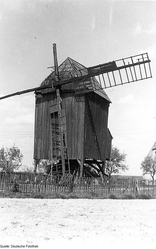 Original image description from the Deutsche Fotothek Beiersdorf. Bockmühle